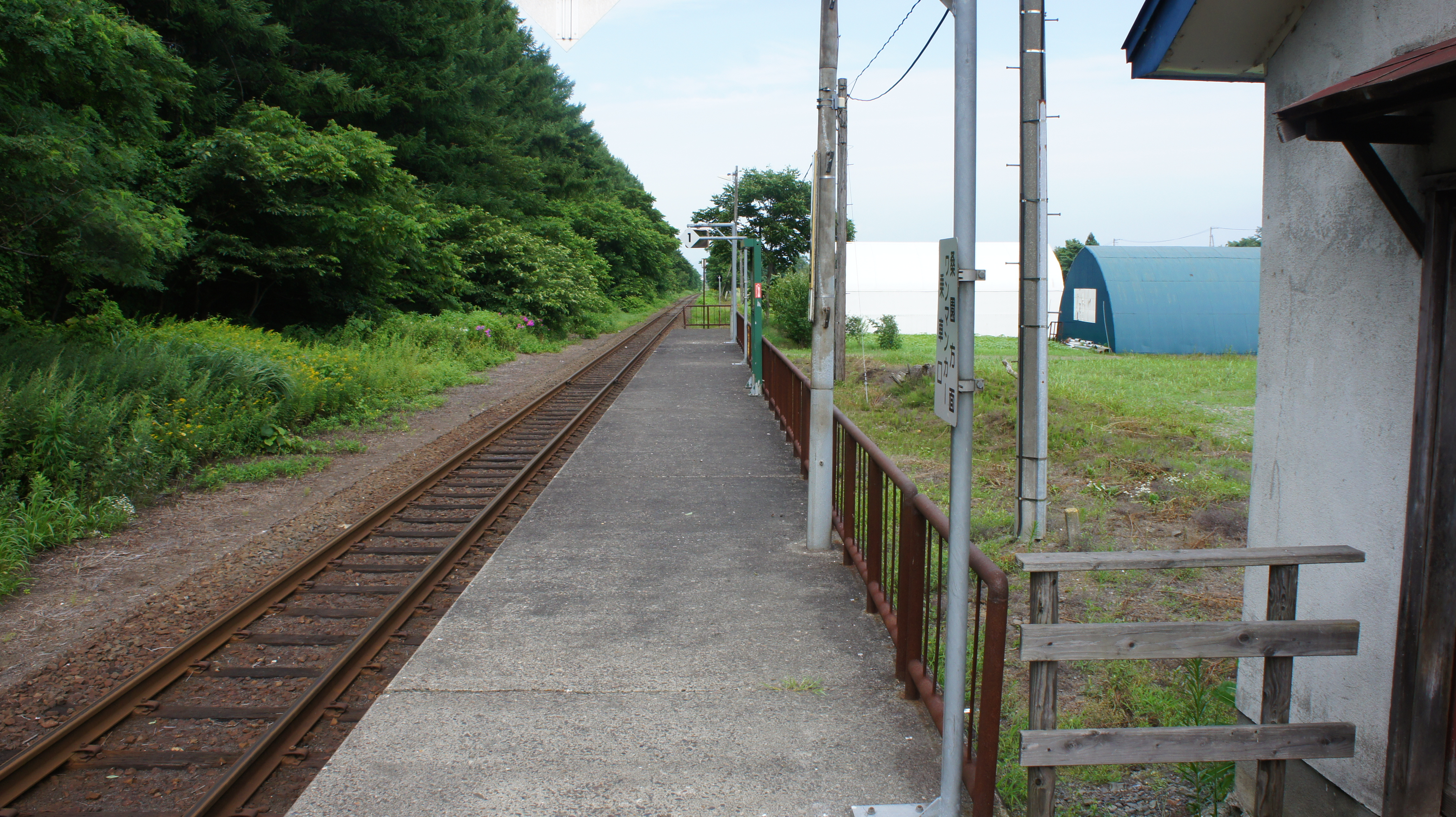 JR札沼線・札的駅のホーム